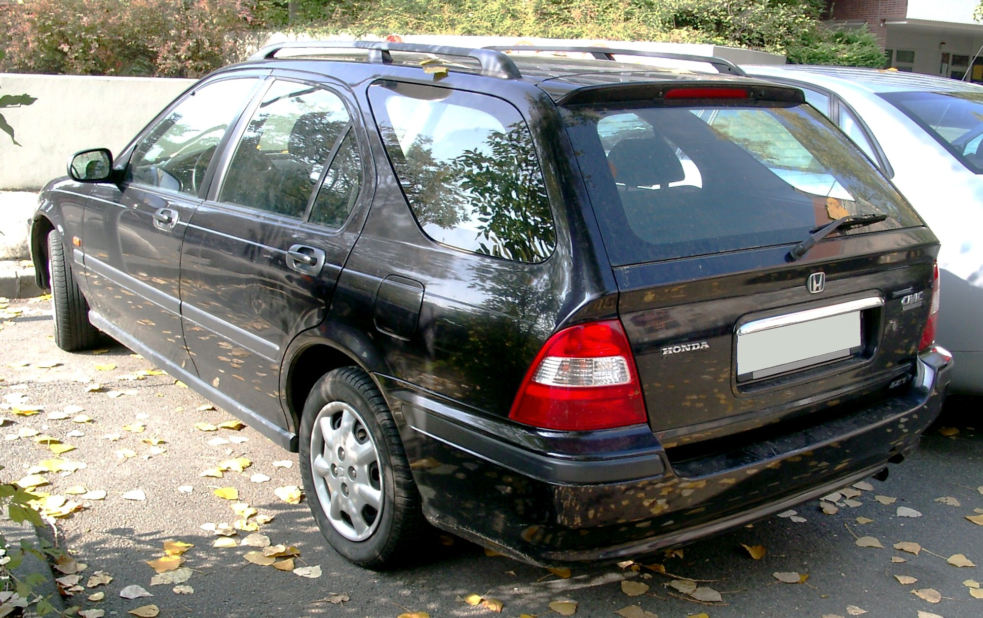 Honda Civic, Aerodeck, 6. Generation